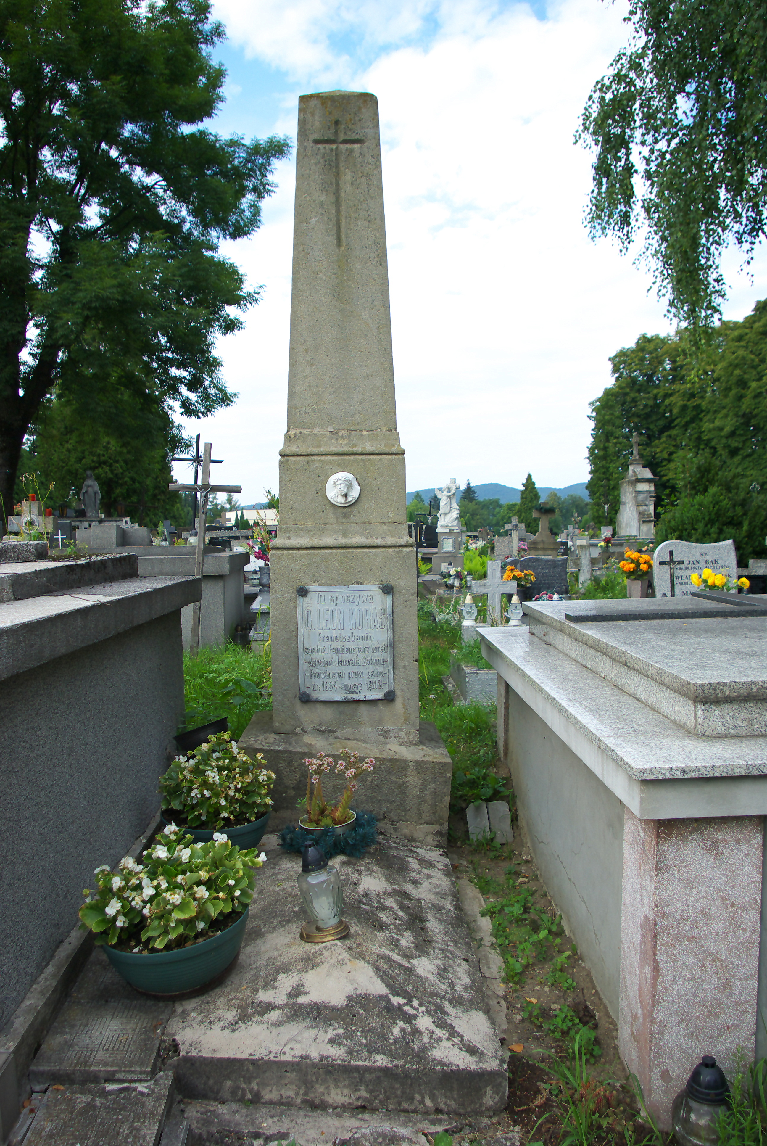 Nagrobek o. Leona Norasa na Cmentarzu Centralnym w Sanoku